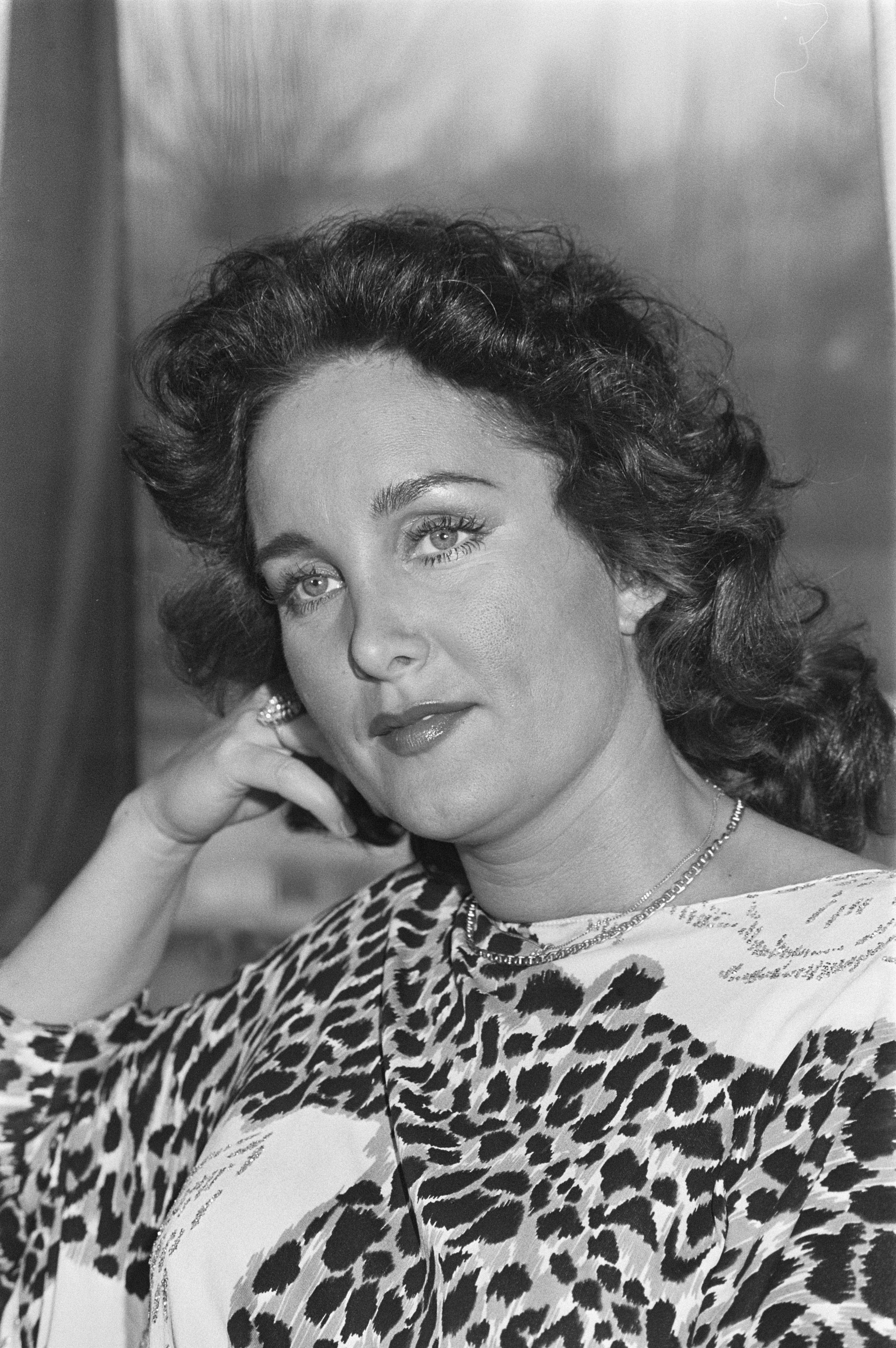 Collectie / Archief : Fotocollectie Anefo Reportage / Serie : [ onbekend ] Beschrijving : Uitreiking "Kruiwagen" en " Export Prijs" tijdens radioprogramma Open House . Shirley Datum : 31 december 1981 Trefwoorden : RADIOPROGRAMMAS, Uitreikingen Persoonsnaam : Shirley Fotograaf : Dijk, Hans van / Anefo Auteursrechthebbende : Nationaal Archief Materiaalsoort : Negatief (zwart/wit) Nummer archiefinventaris : bekijk toegang 2.24.01.05 Bestanddeelnummer : 931-8893